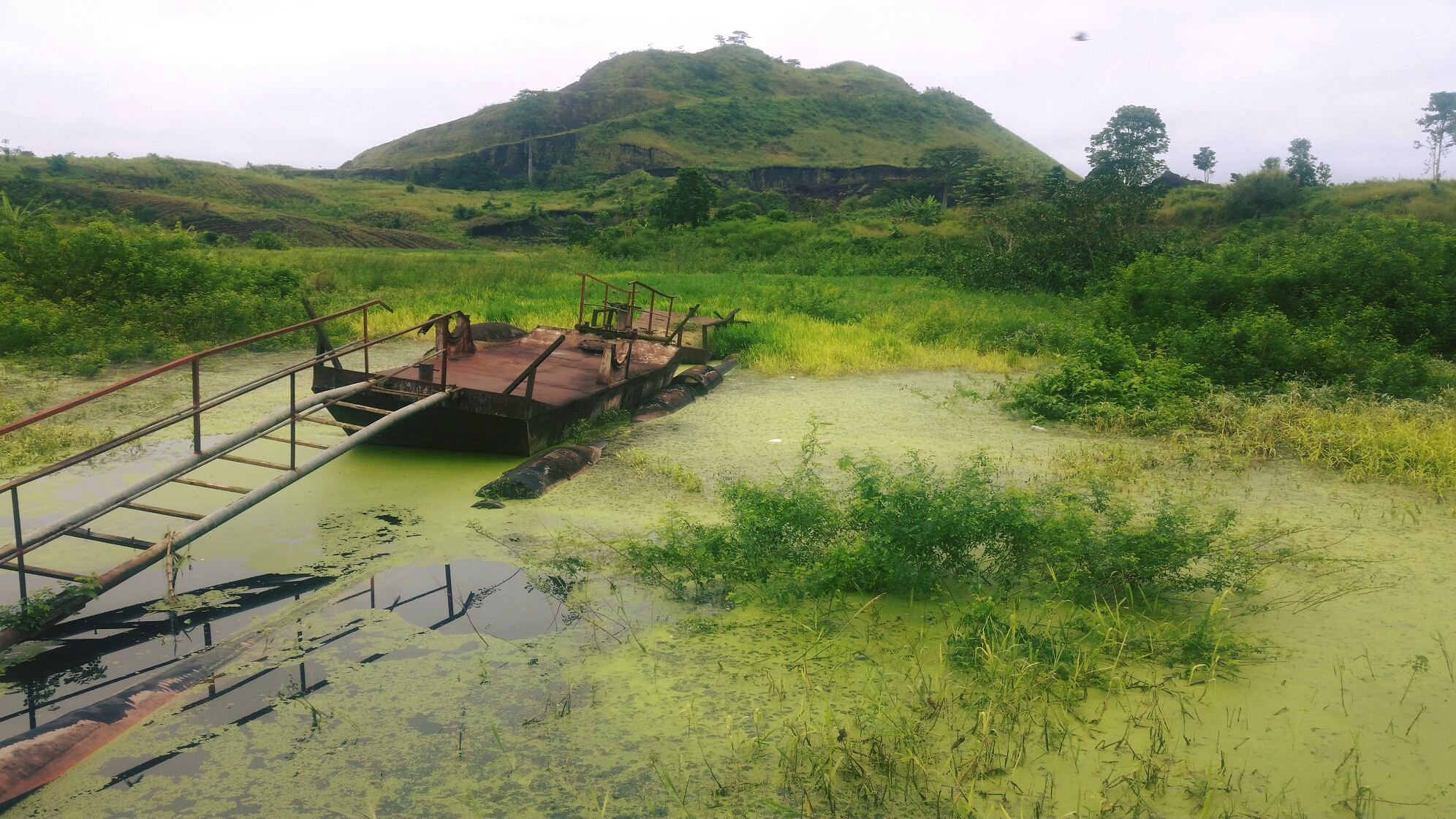 Le Mont Djoungo de Njombe vu de la station de pompage d'eau du Trou Dia-Dia.